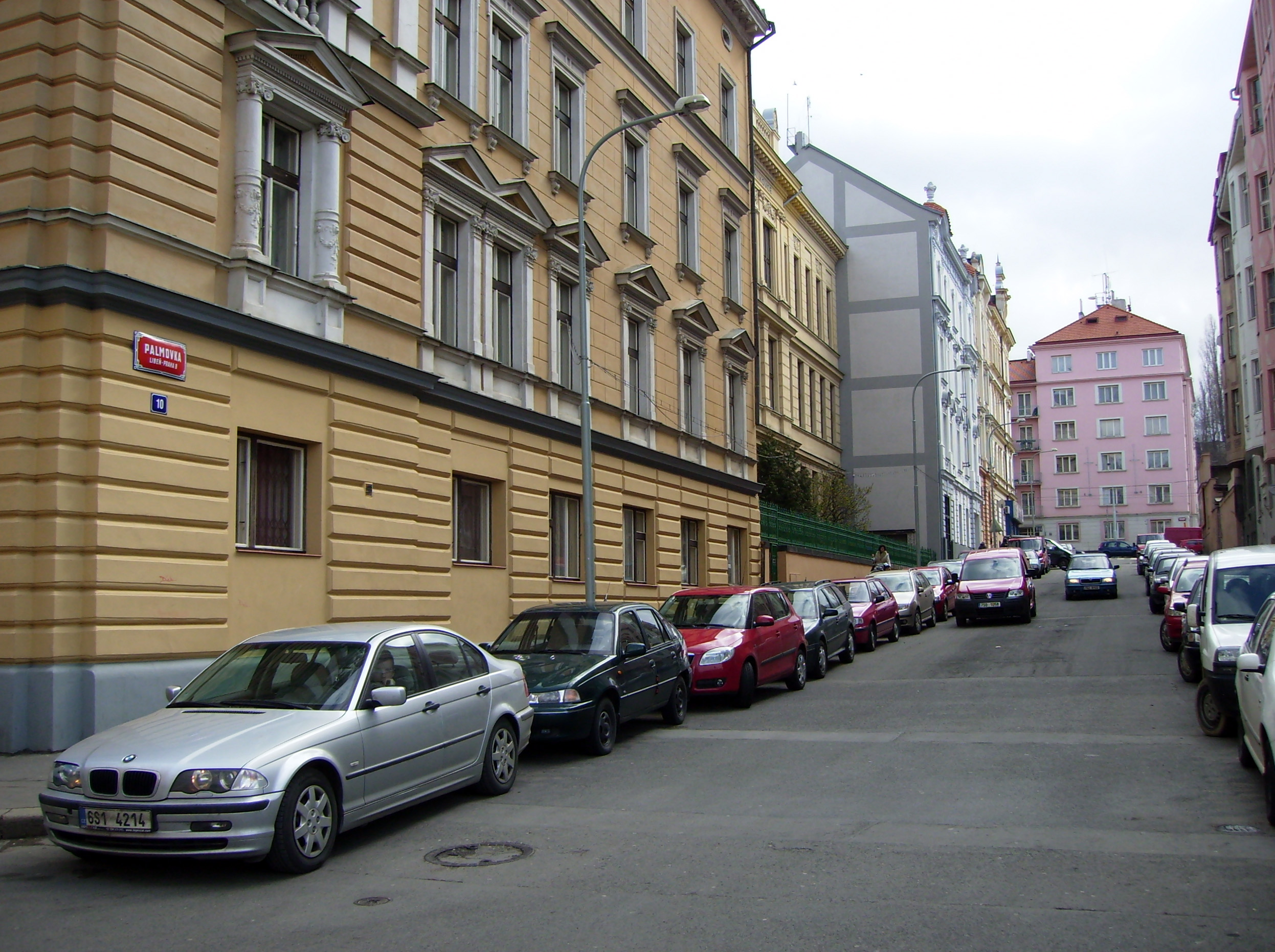 Ulice Palmovka v Praze 8-Libni